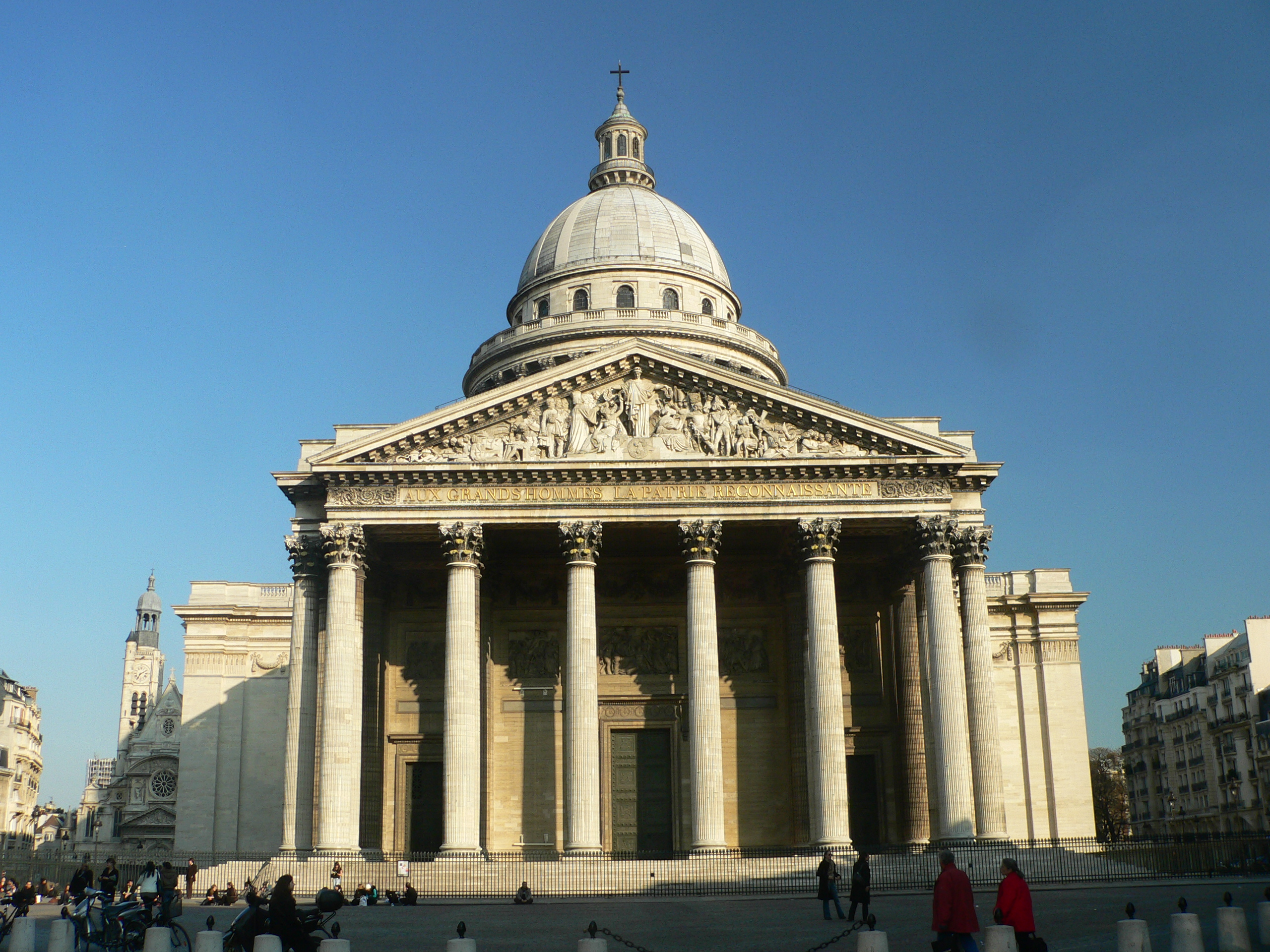 Panthéon de Paris